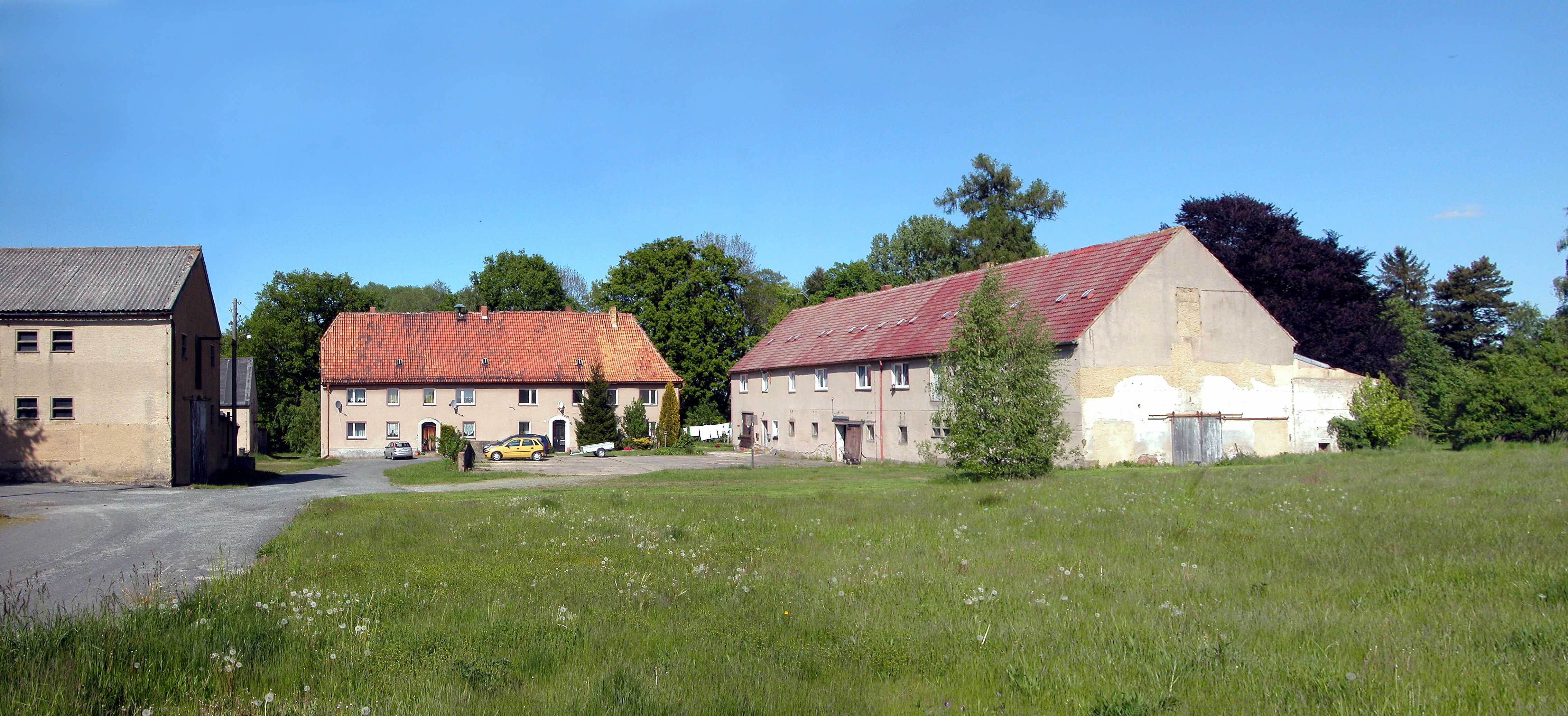 15.05.2015 01877 Pottschapplitz (zu Demitz-Thumitz): Rittergut, mittig Herrenhaus. Ringstr. 6 [DSCN5746+5747.JPG]20150515370MDR.JPG(c)Blobelt